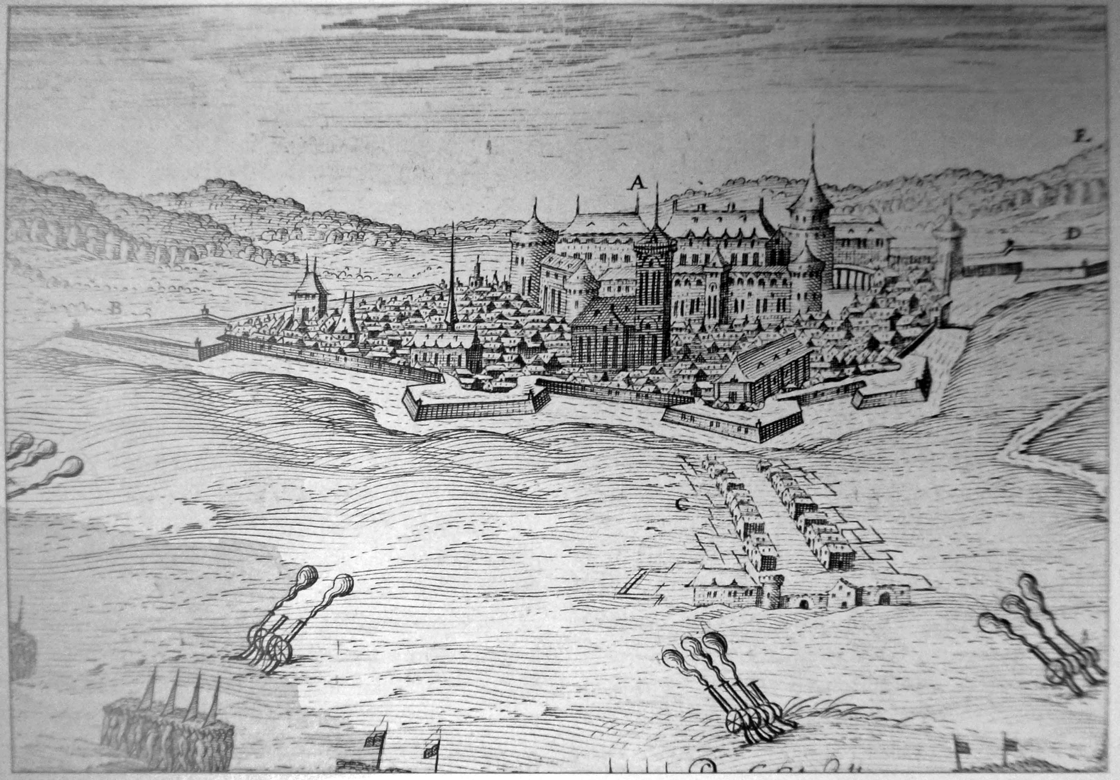 St-Dizier in Davanne-Chappier.